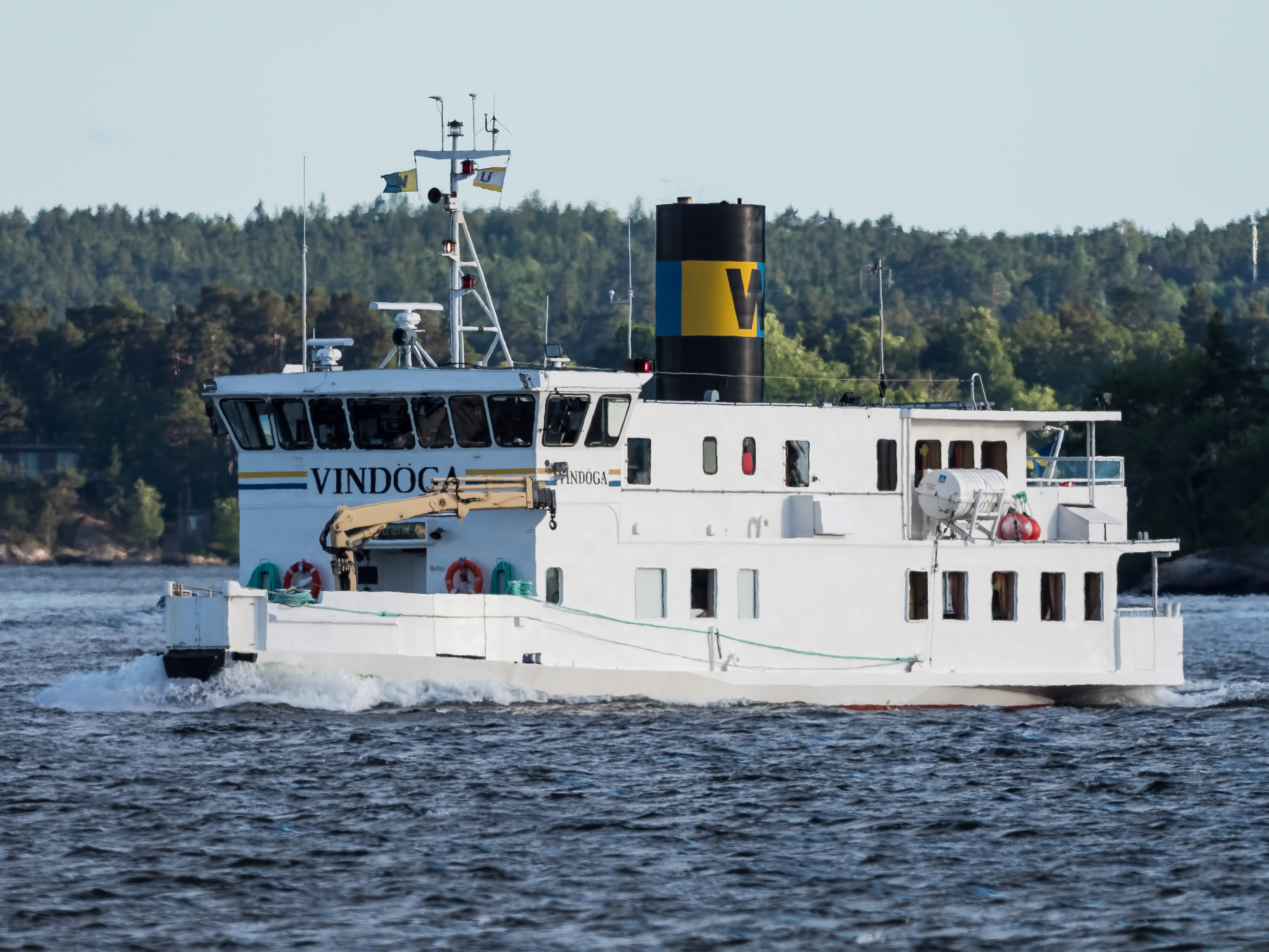 Vindöga